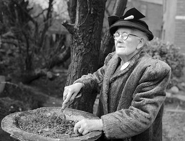 Teitl Cymraeg/Welsh title: Mrs Jones, Ponciau, Rhosllannerchrugog, mam T W Jones, AS, a Idwal Jones, AS. Ffotograffydd/Photographer: Geoff Charles (1909-2002) Dyddiad/Date: March 24, 1955. Cyfrwng/Medium: Negydd ffilm / Film negative Cyfeiriad/Reference: (gch07895) Rhif cofnod / Record no.: 3368469 Rhagor o wybodaeth am gasgliad Geoff Charles yn Llyfrgell Genedlaethol Cymru More information about the Geoff Charles Collection at the National Library of Wales